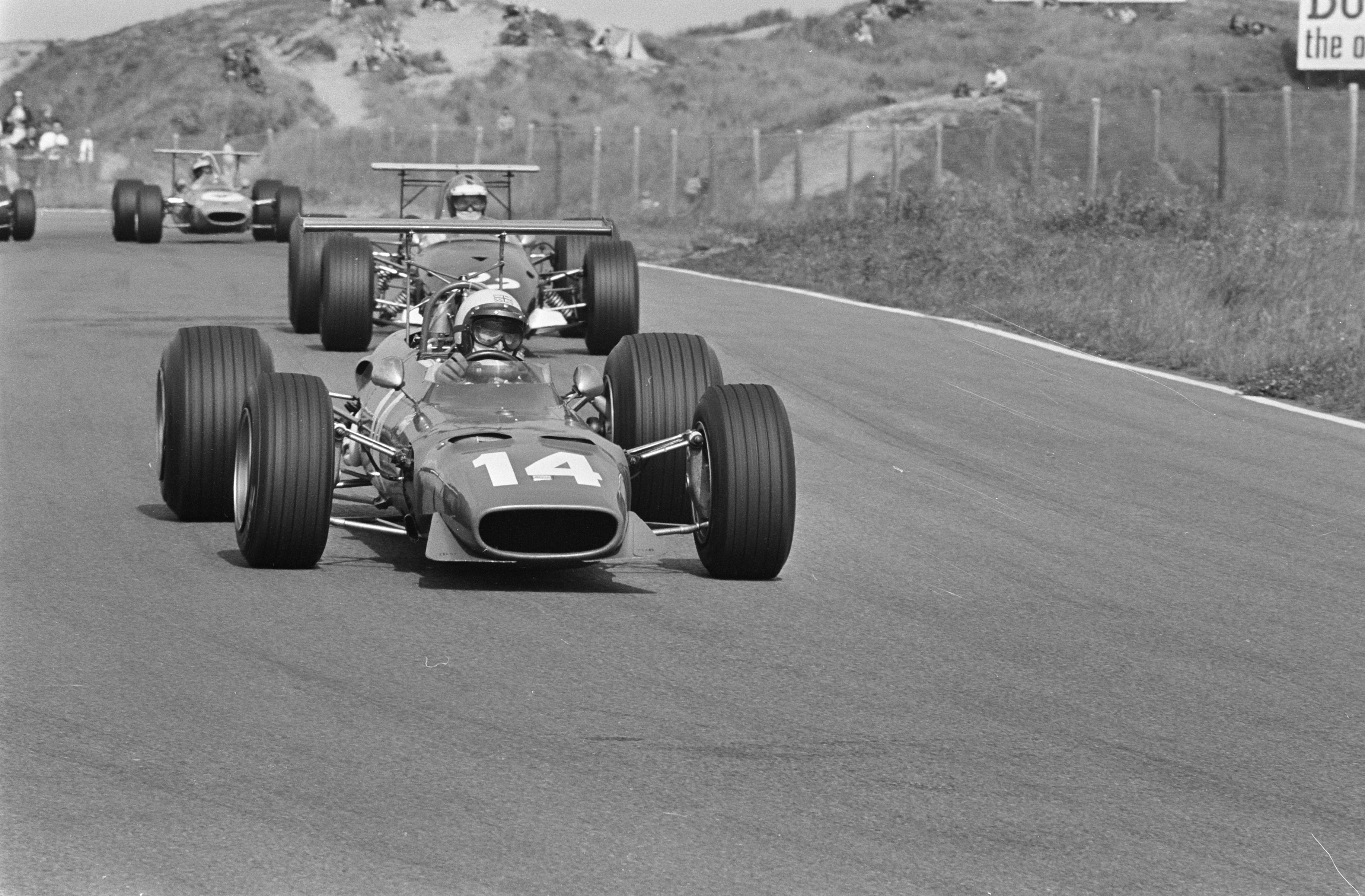 Derek Bell sur la Ferrari numéro 14 en 1968 à Zandvoort.